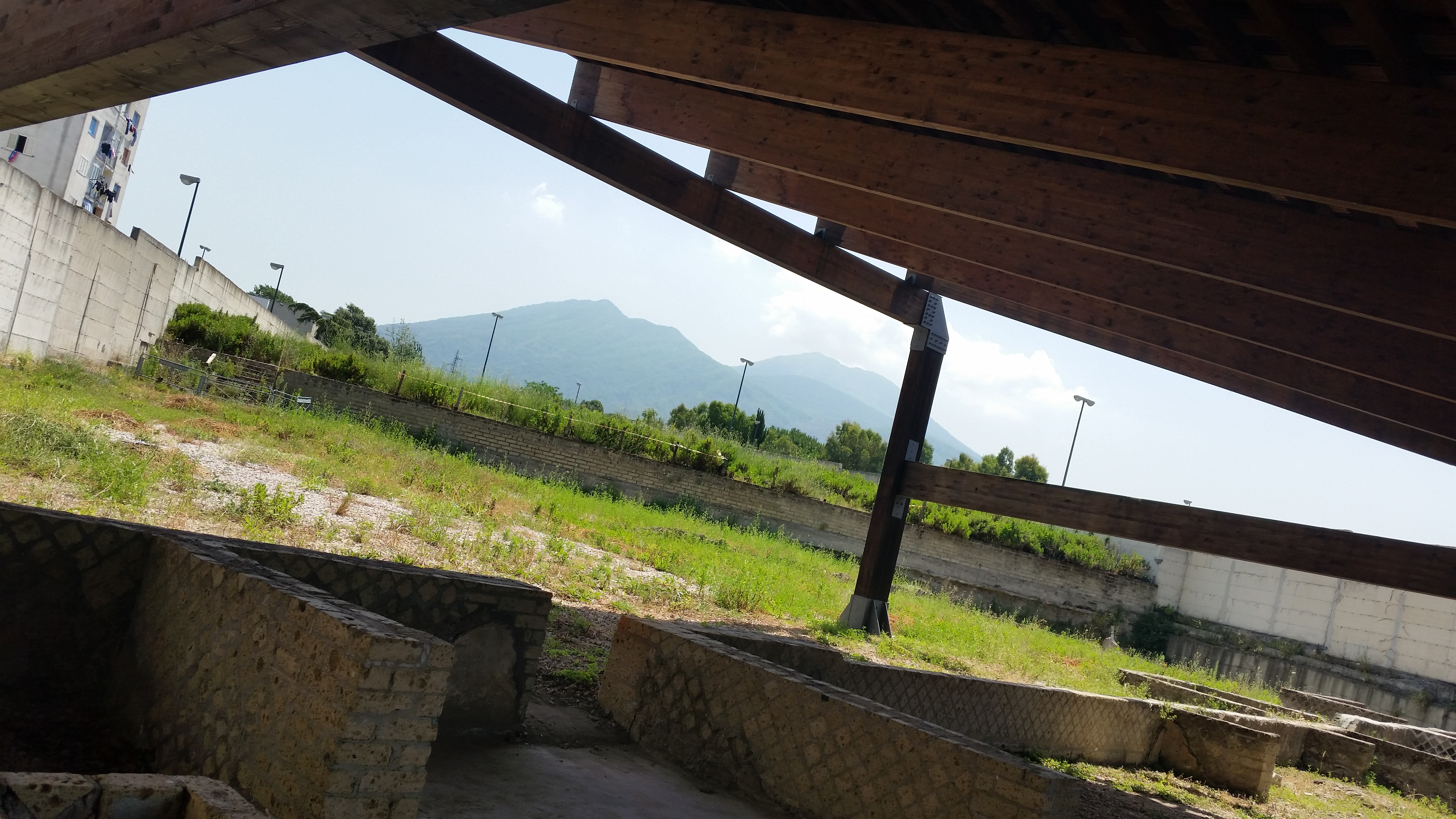 Vista del Vesuvio, dall'interno della Villa Romana